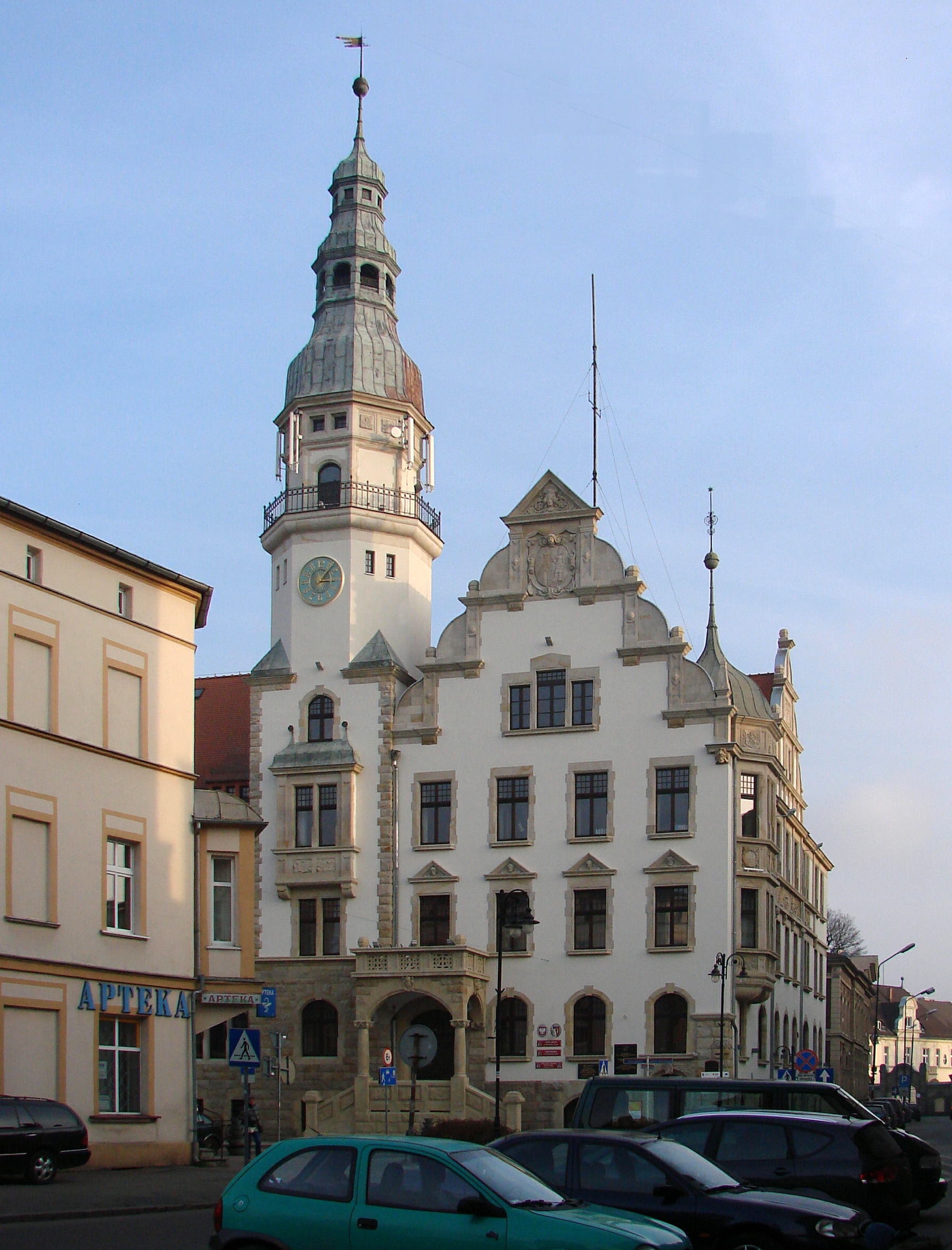 Kamienna Góra, pl. Grunwaldzki 1 - ratusz